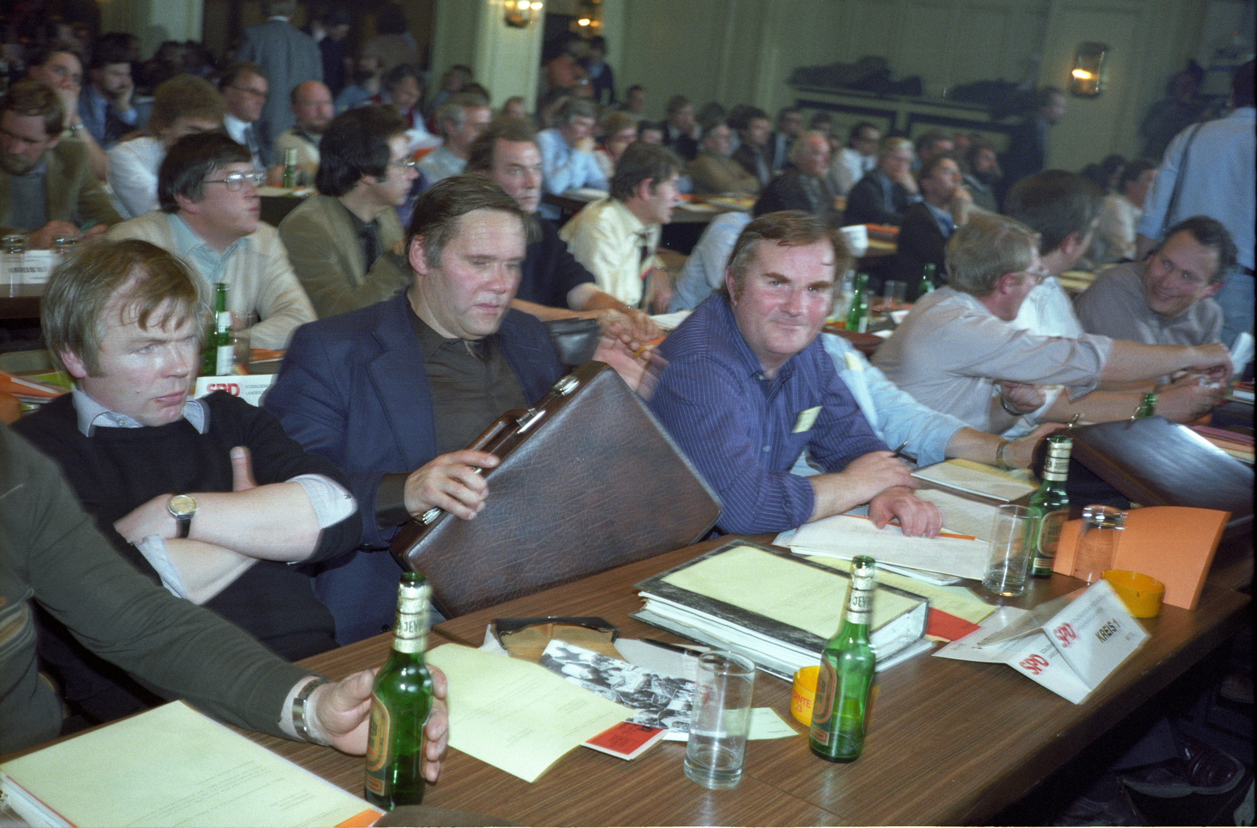 Uwe Hansen (3. von links) auf einem SPD-Landesparteitag um 1982 in Hamburg.